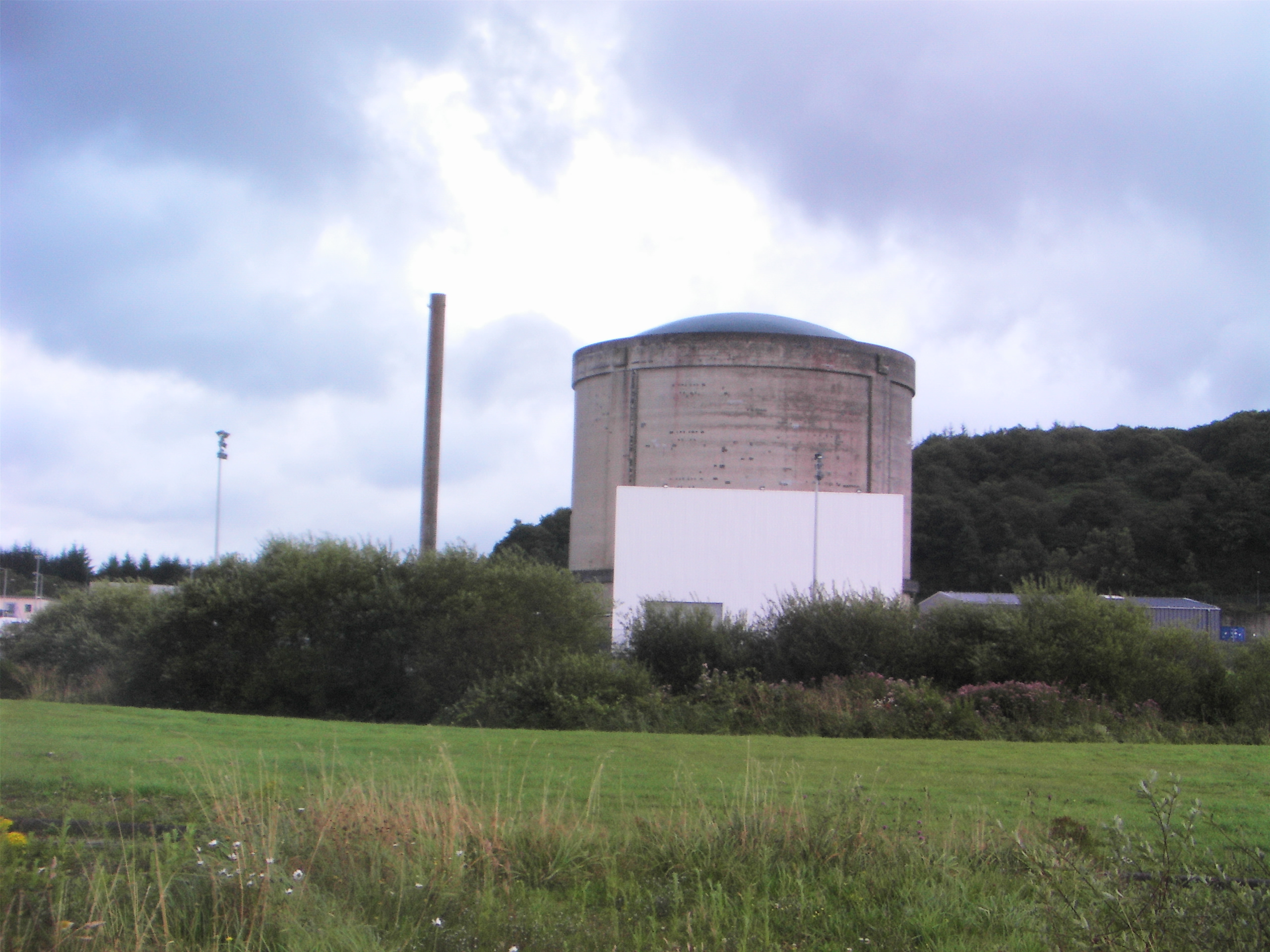 Site nucléaire de Brennilis